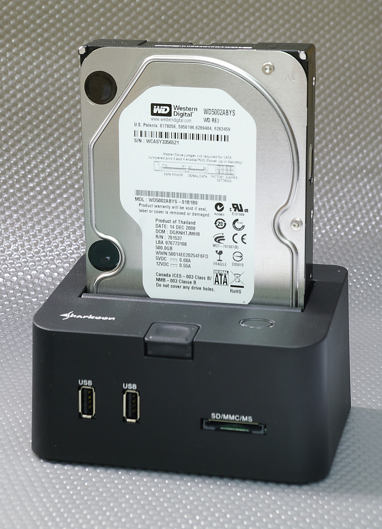 Dockingstation für 3.5"-SATA-Festplatten. Das Gerät ermöglicht den Betrieb einer SATA-Festplatte, erlaubt hot-plugging und kann per USB oder ESATA an einen Rechner angeschlossen werden. Es bietet zusätzlich zwei USB-Anschlüsse und einen SDHC-Kartenleser